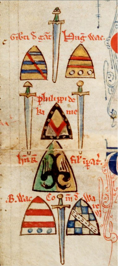 Zemřelí roku 1242 - Six reversed shields. Gilb. de Gaunt. Hugo Wac. Phil. de Kime. Henr. fil. imperatoris. Baldwin Wac. Comes de Warewic.